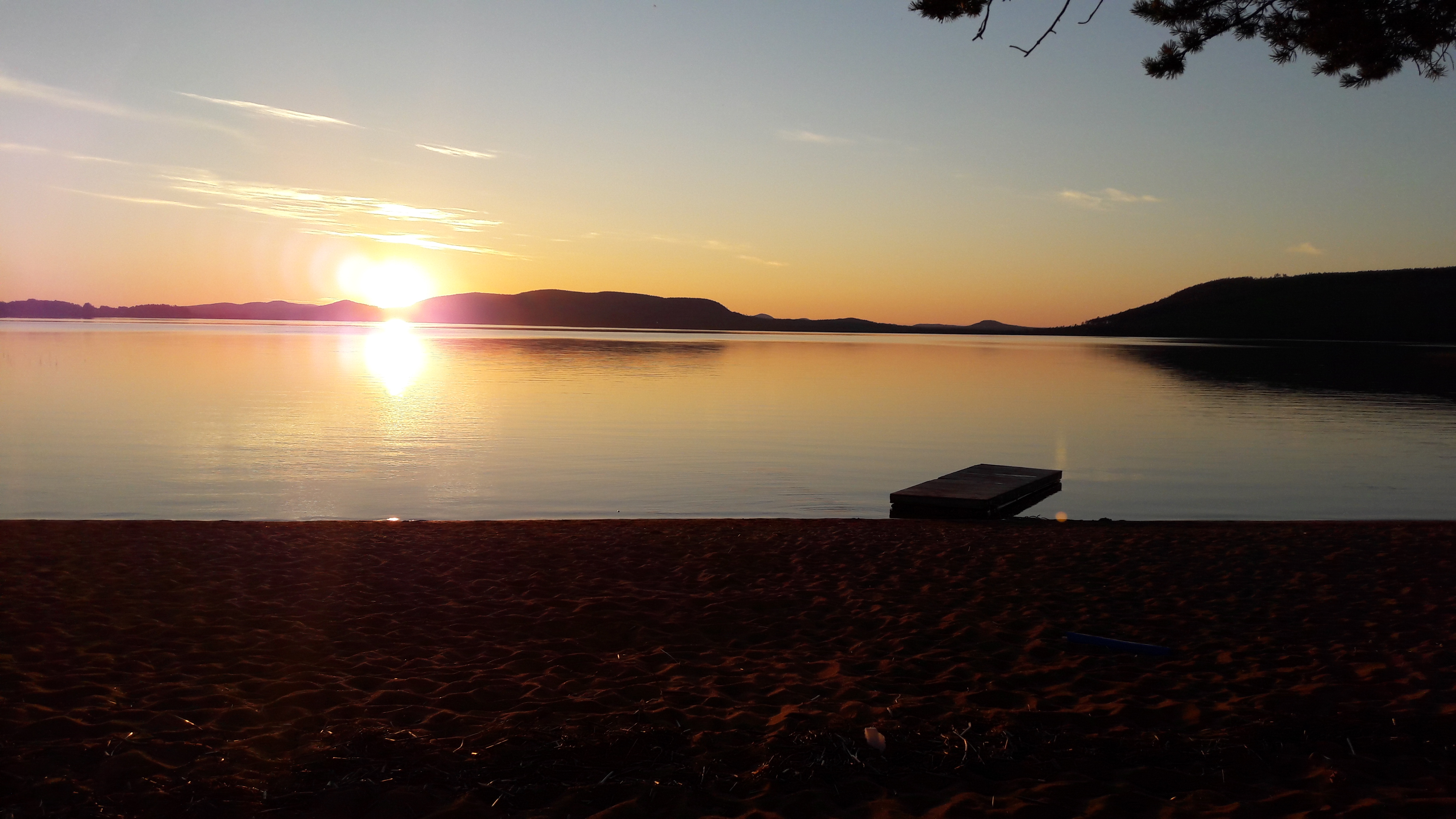 Sanningslandet, strand i Lansjärv.